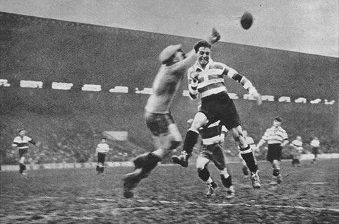 scène de derby entre le SO Montpelliérains (Montpellier Hérault Sport Club) et le FC Sète en 1930